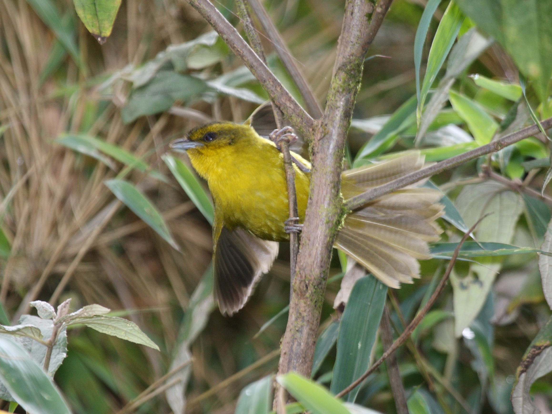 Parodi's Hemispingus in Peru